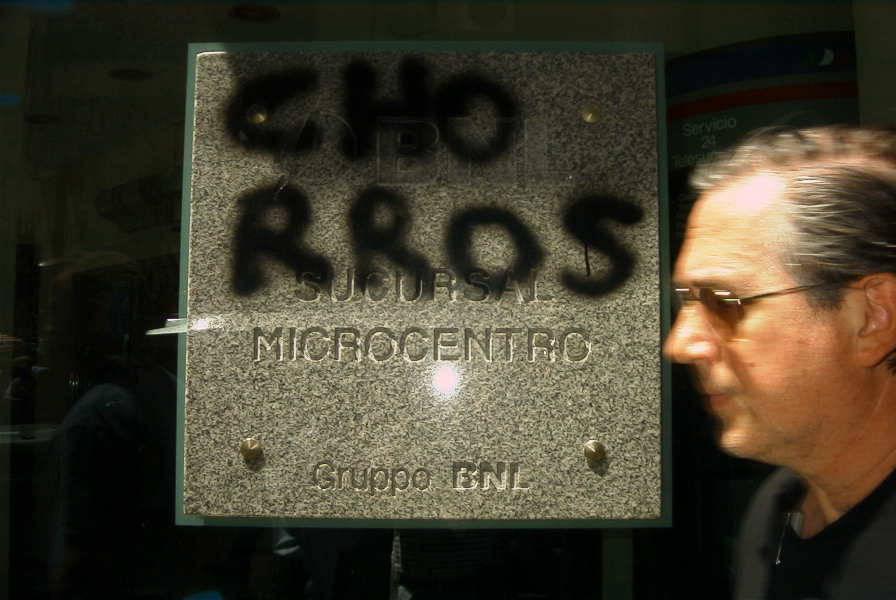 Manifestación de ahorristas argentinos contra el Corralito financiero. Pintada "CHORROS" (en lunfardo: ladrones) en una sucursal de la BNL ubicada en Corrientes y San Martín, Buenos Aires, Argentina.